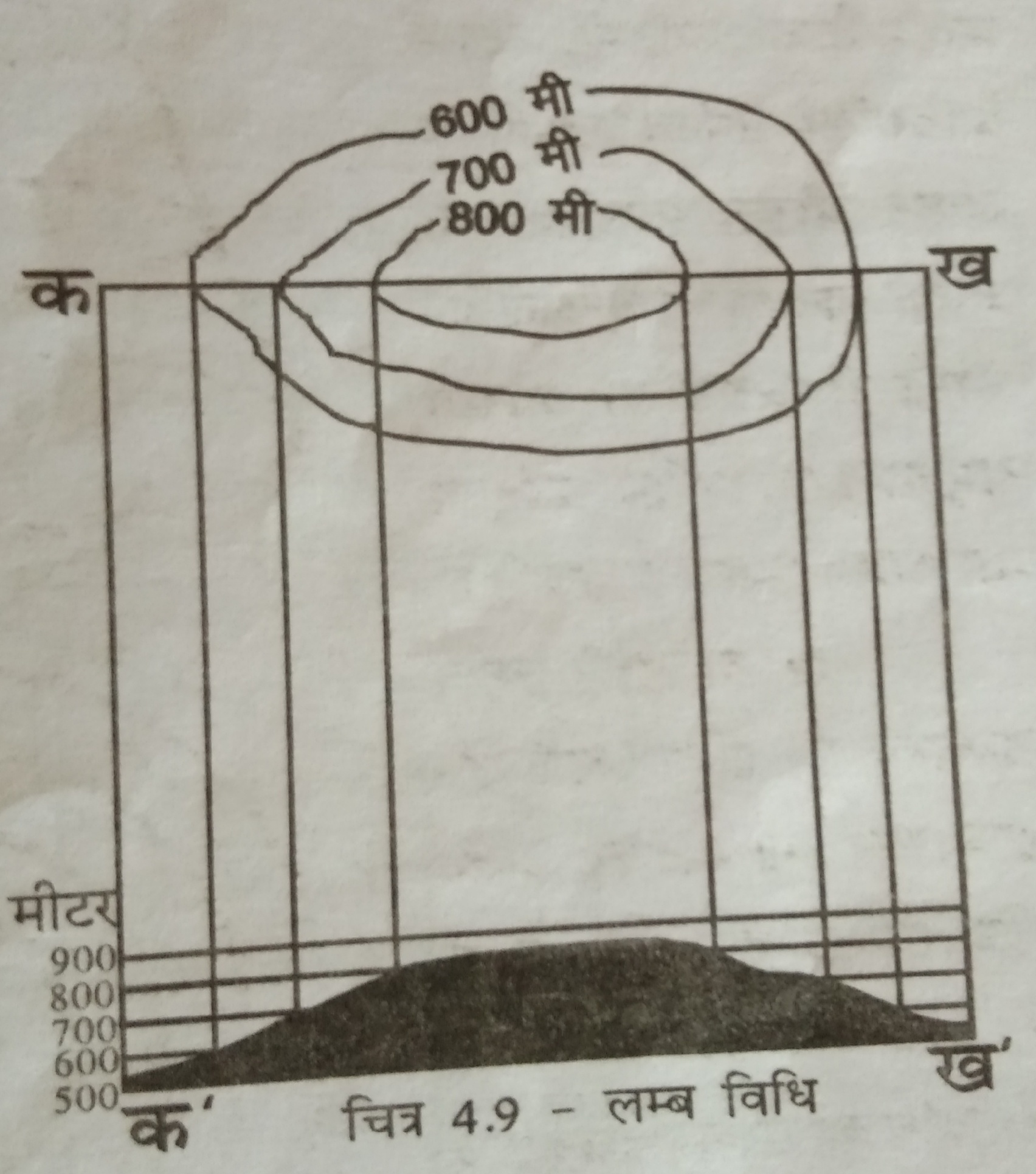 समोच्च रेखा विधि उच्चावच दर्शाने की